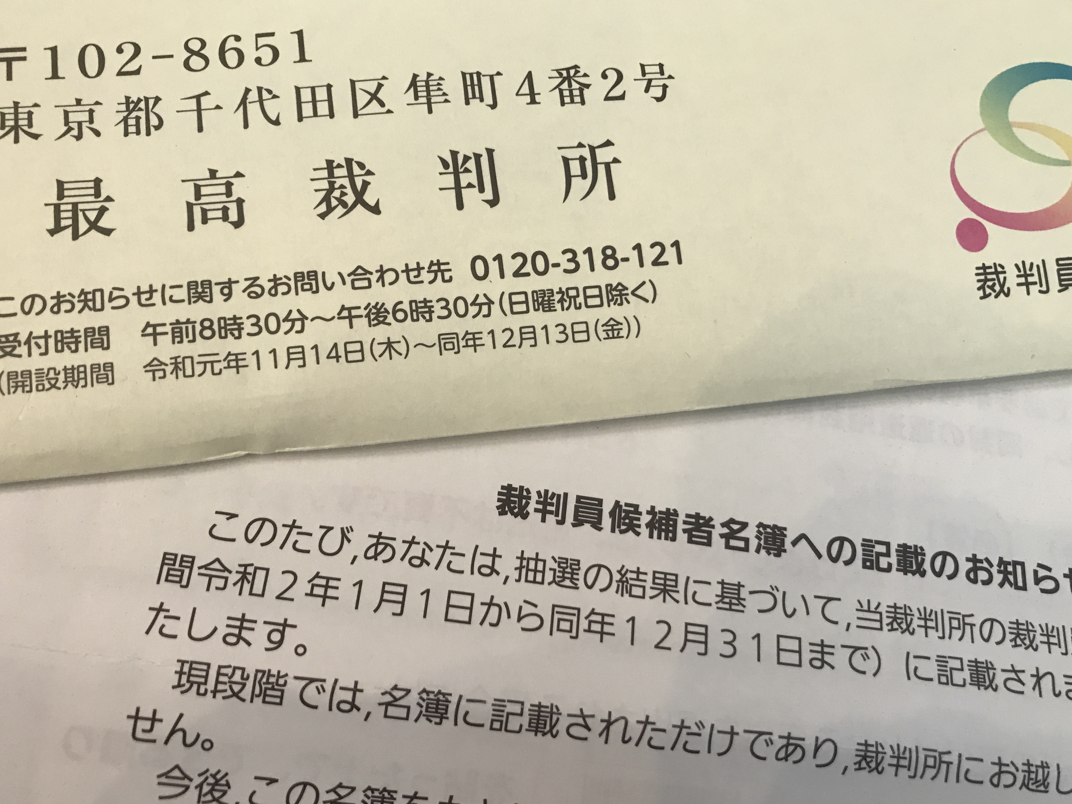 裁判員制度の裁判員として登録されたことを通知する最高裁からの手紙